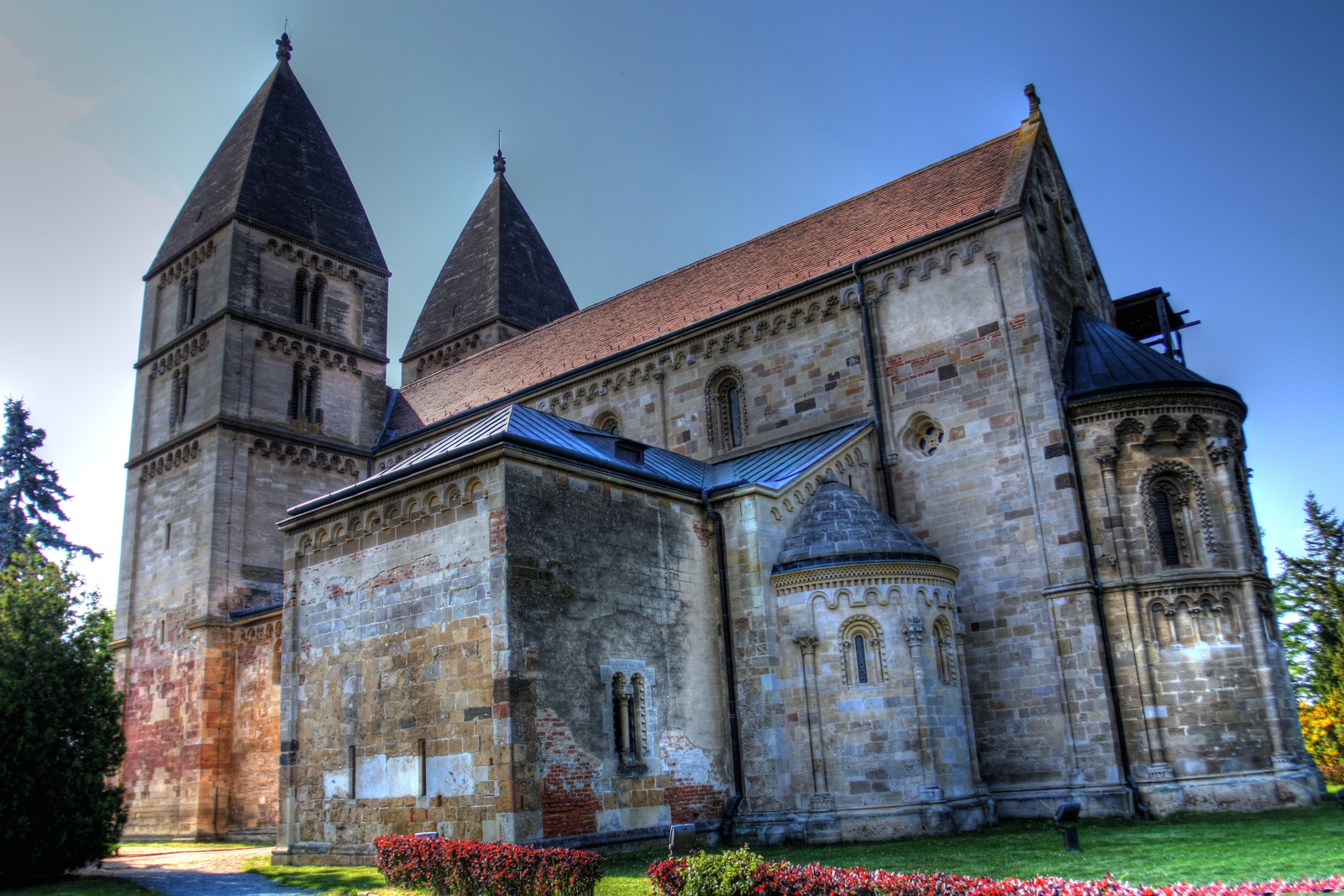 Apátsági templom (Ják, Szabadnép u.) This is a photo of a monument in Hungary. Identifier: 8941